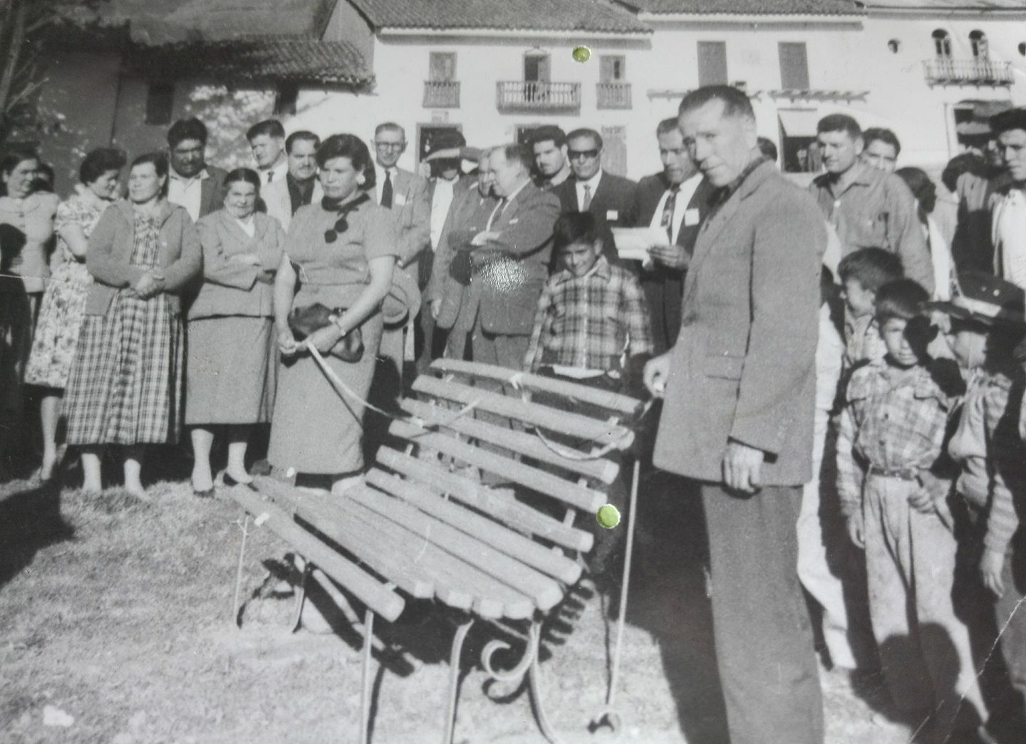 Inauguración de una banca en la plaza de Chacas en la década del 60, en la foto se distinguen a Carmen del Río y Vicente Handabaka (alcalde) sosteniendo las cintas; Blanca del Río, Abigail Amez, Enrique Amez, Carlos Conroy, Amelia Aguirre ,Elvina Roca, Concepción Vidal , Pedro Rodríguez, Rowney Amez y Olinda Amez.